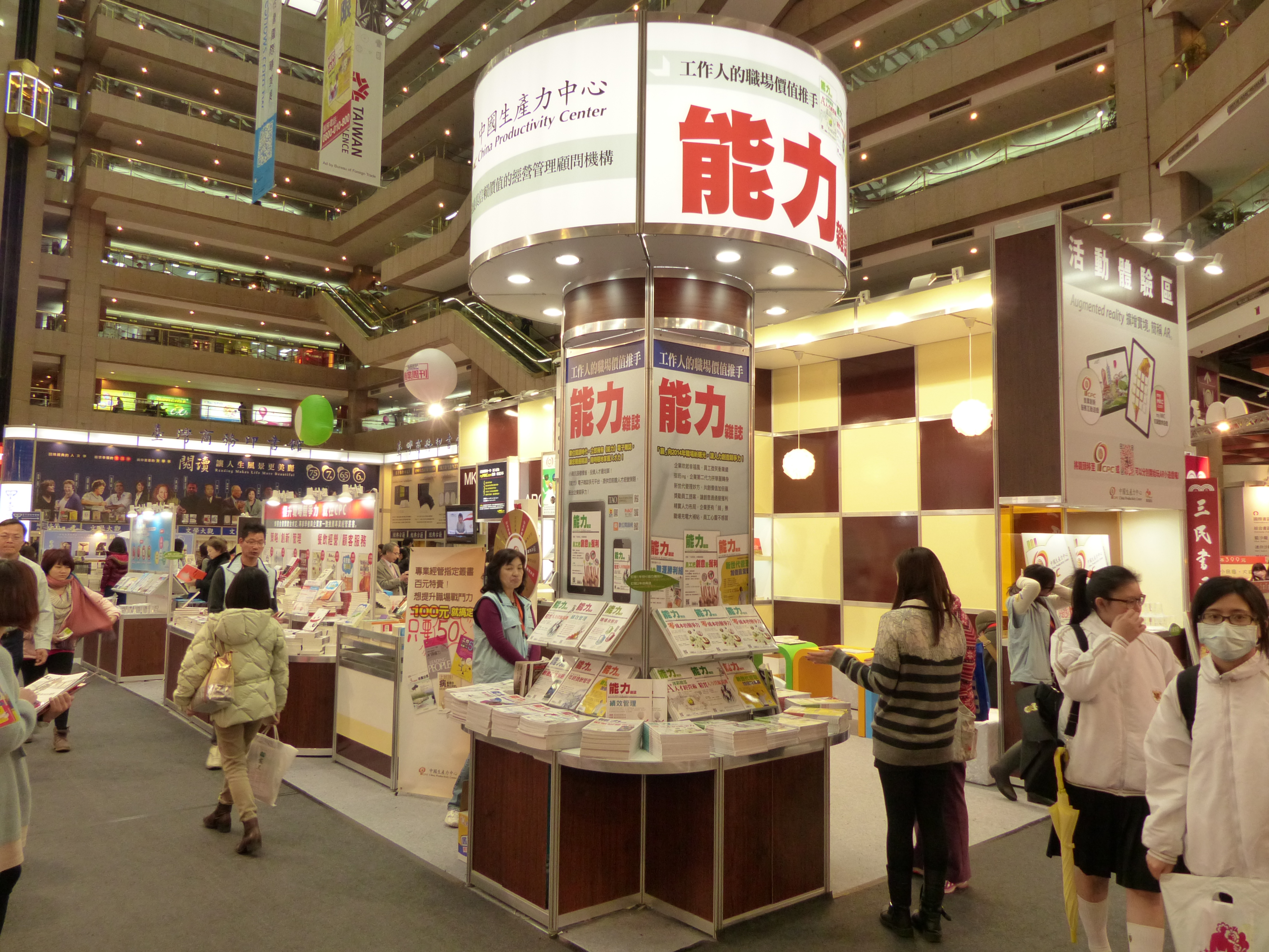 第22屆臺北國際書展，世貿一館中國生產力中心攤位。